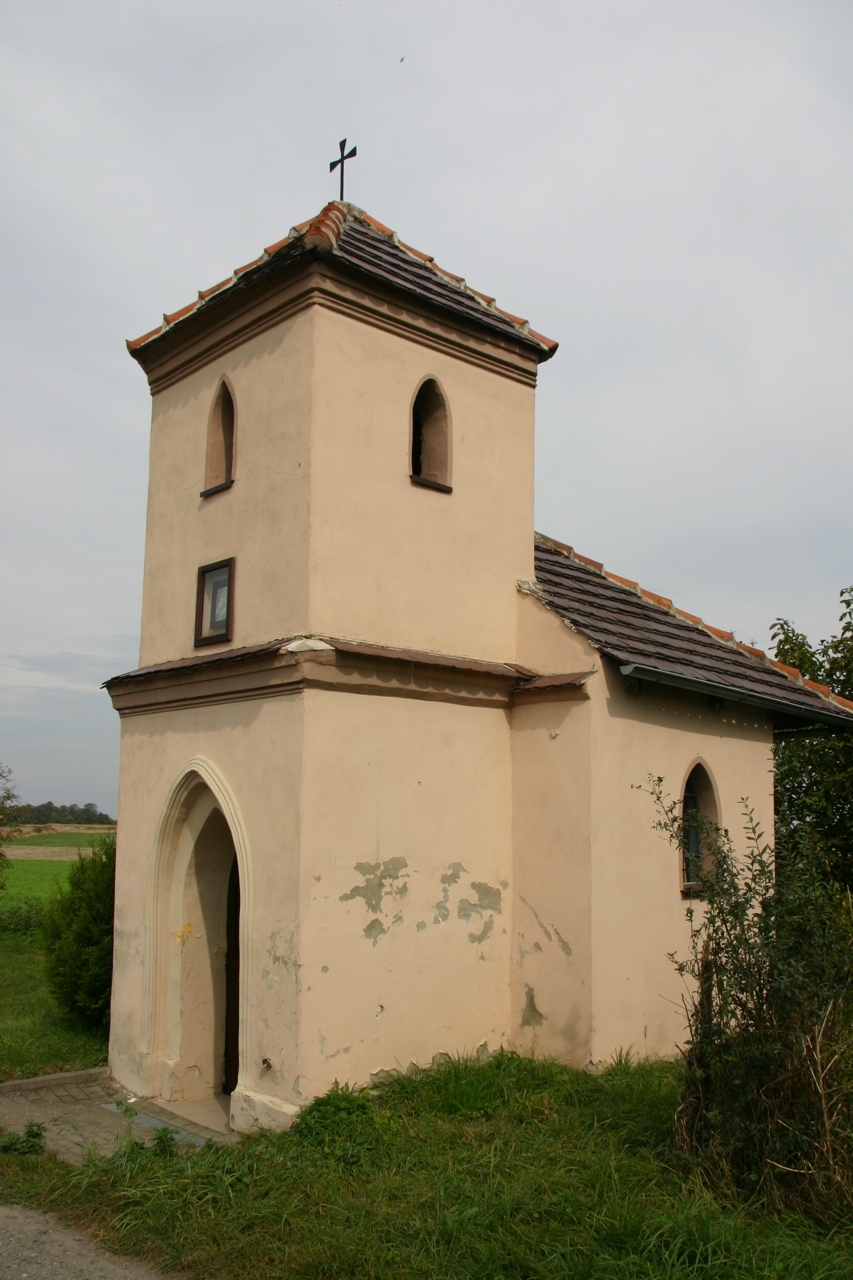 Zawada (dodatkowa nazwa w j. niem. Zowade) – wieś w Polsce położona w województwie opolskim, w powiecie prudnickim, w gminie Głogówek – Barokowa kapliczka-dzwonnica pod wezwaniem św. Józefa wybudowana w II połowie XVIII wieku na skraju wsi.